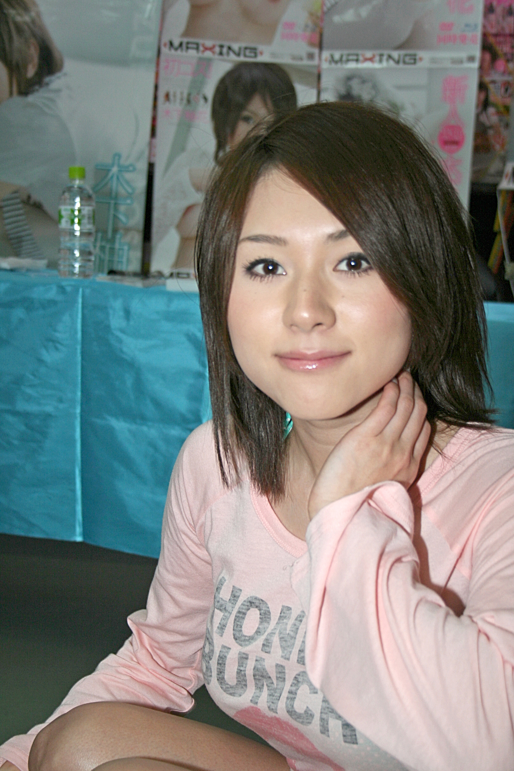 木下柚花。兵庫県姫路市で行なわれたサイン会にて撮影。